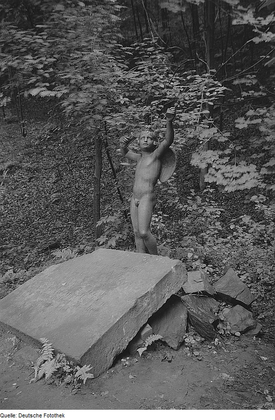 Original image description from the Deutsche Fotothek Seifersdorfer Tal (Skulptur des Amors)